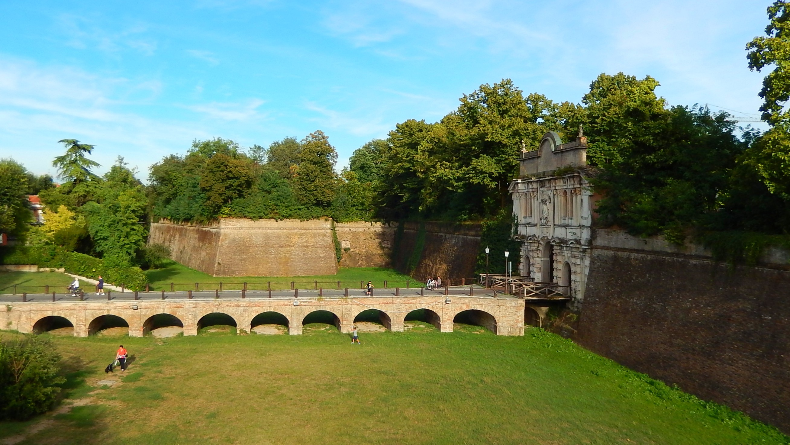 Parma - Ingresso principale della Cittadella This is a photo of a monument which is part of cultural heritage of Italy.